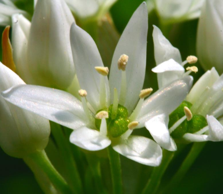 Allium ursinum ENBLA01